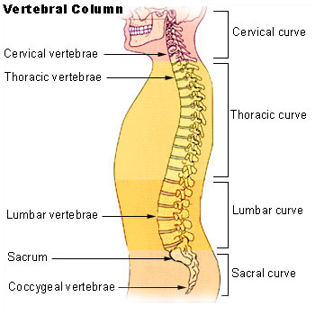 Vertebral column